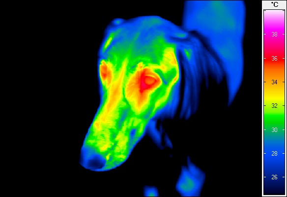 Termogram psa